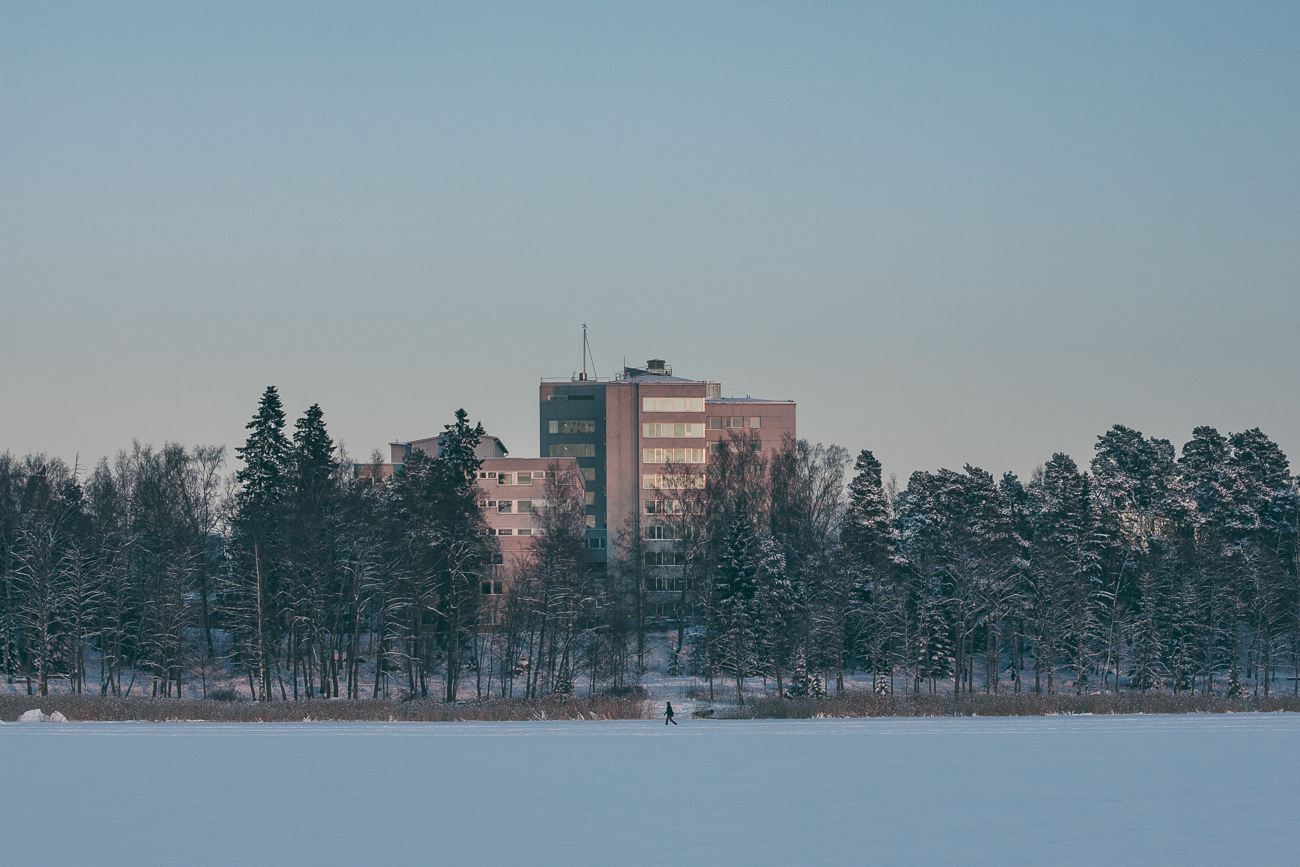 Vasa centralsjukhus sett från Södra Stadsfjärden vintern i januari 2019.